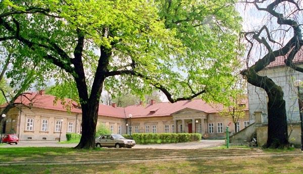 Andrychow (Polska)